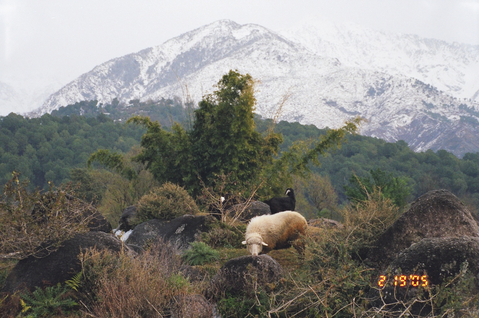 Dhauladhar Range of Himalayas, near Dharamsala, Himachal Pradesh.